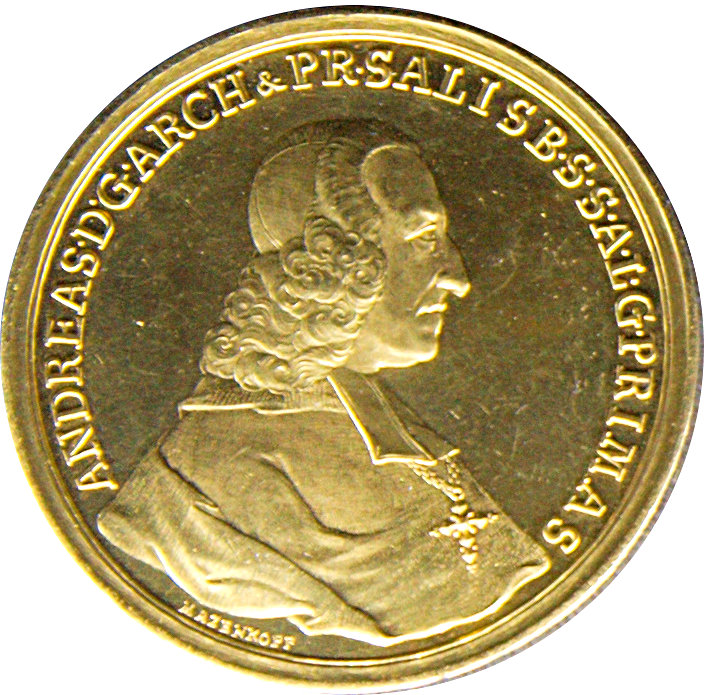 50-facher Dukaten auf die Wahl zum Erzbischof von Salzburg 1747